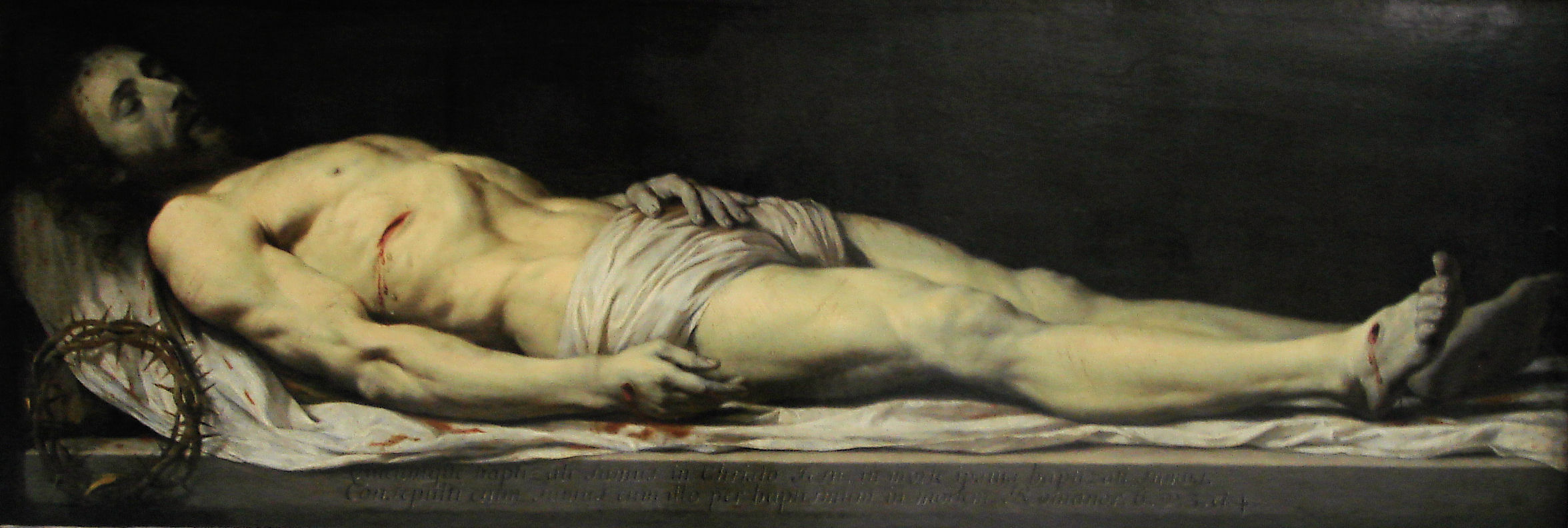 Peint avant 1654, date à laquelle le tableau fut gravé par Nicolas de Plattemontagne.Saisi à la Révolution à l'abbaye de Port-Royal de Paris.